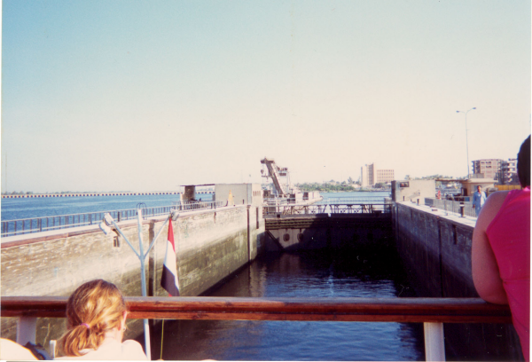 Esclosa a Esna, imatge propia